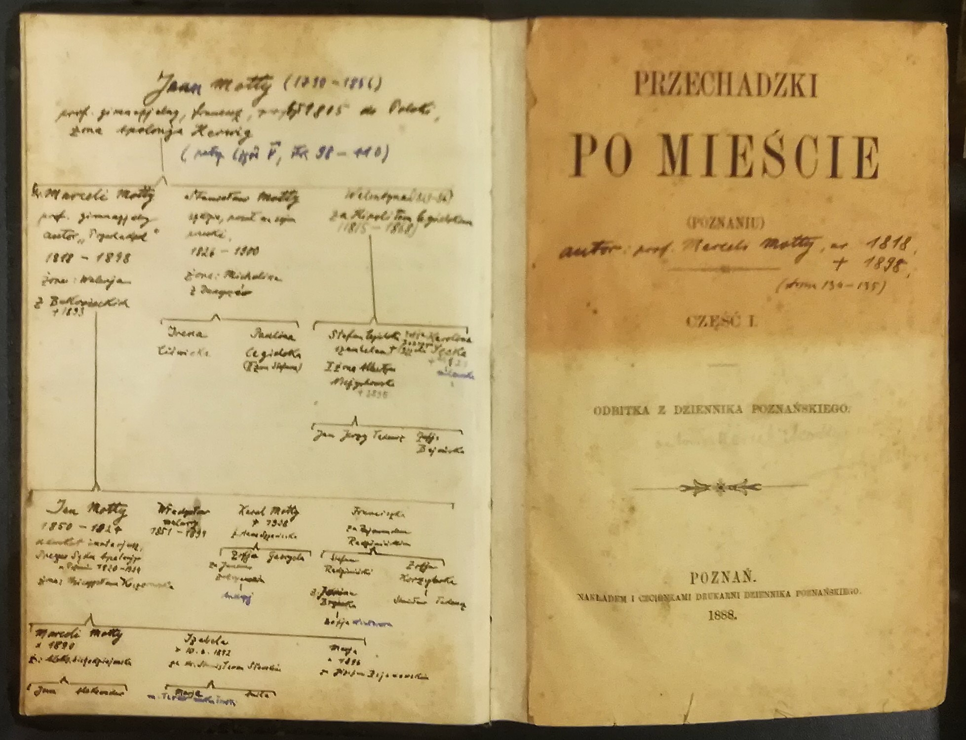 Marceli Motty, Przechadzki po mieście, Poznań, 1888r.